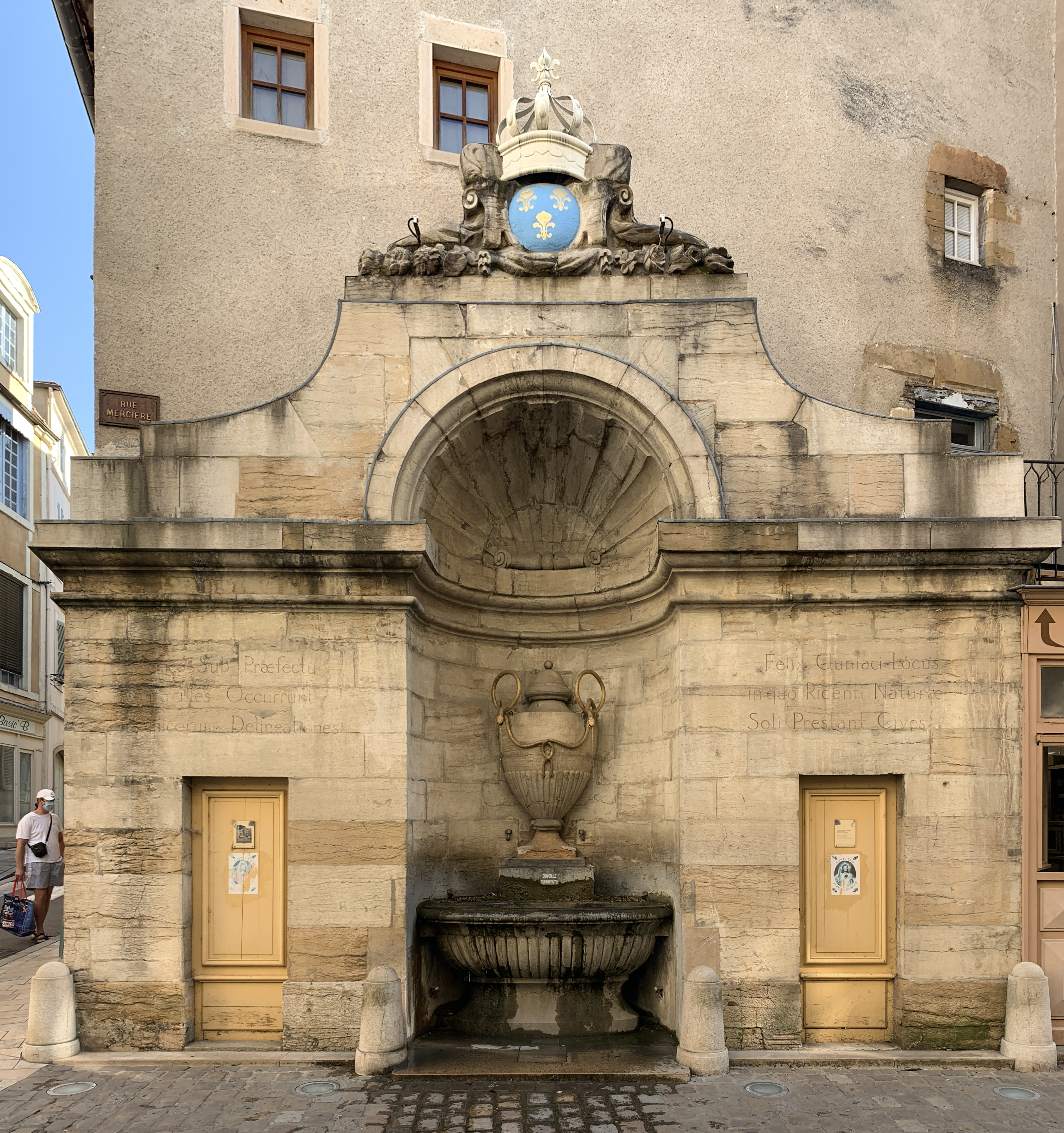 Fontaine des Serpents, Paris.